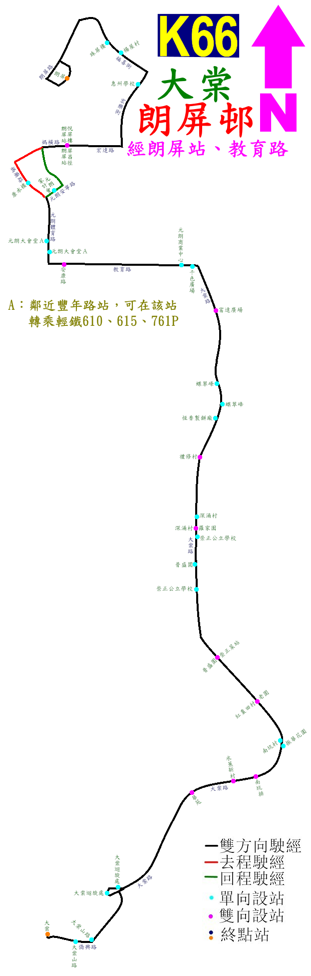 中文（香港）: 港鐵巴士K66線的走線圖(2015年版)